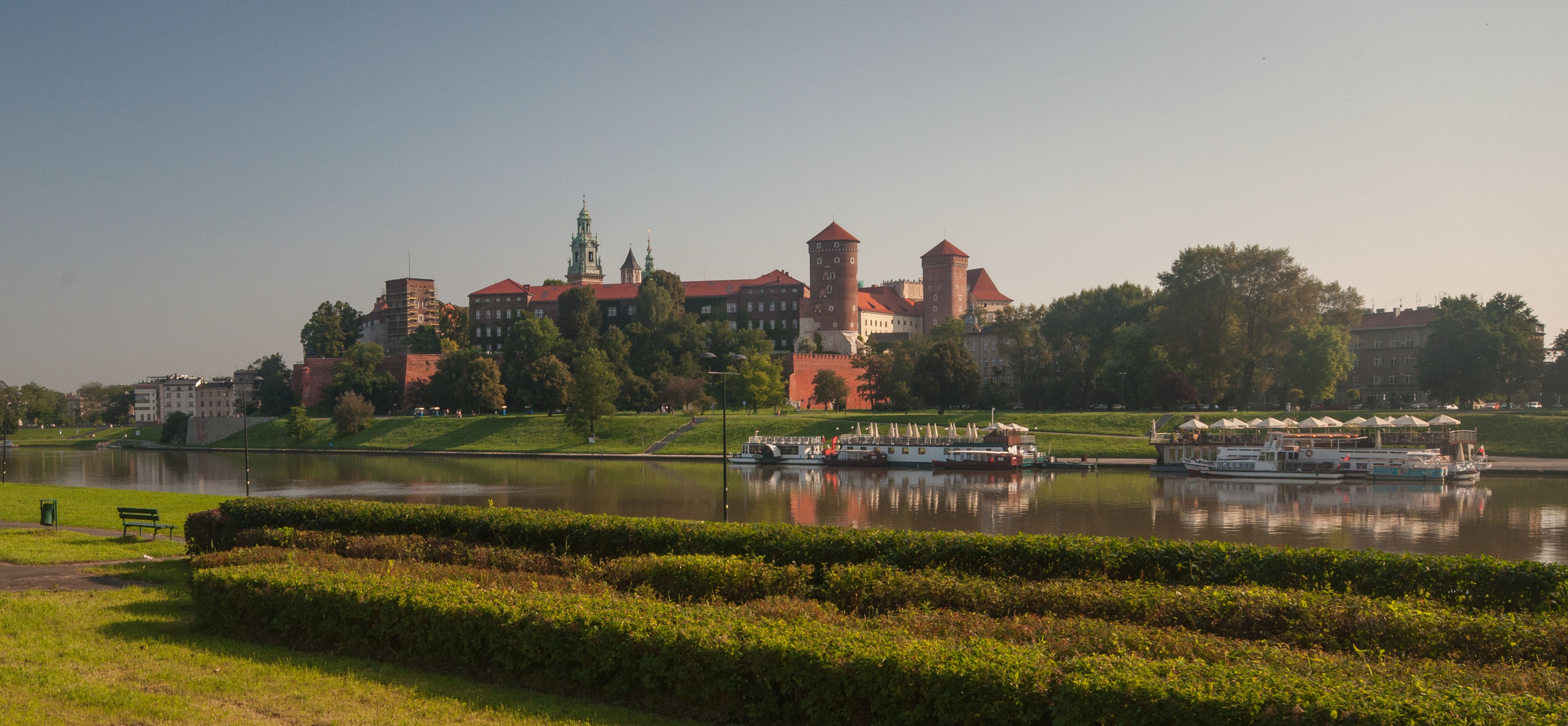 Kraków, zespół Wzgórza Wawelskiego